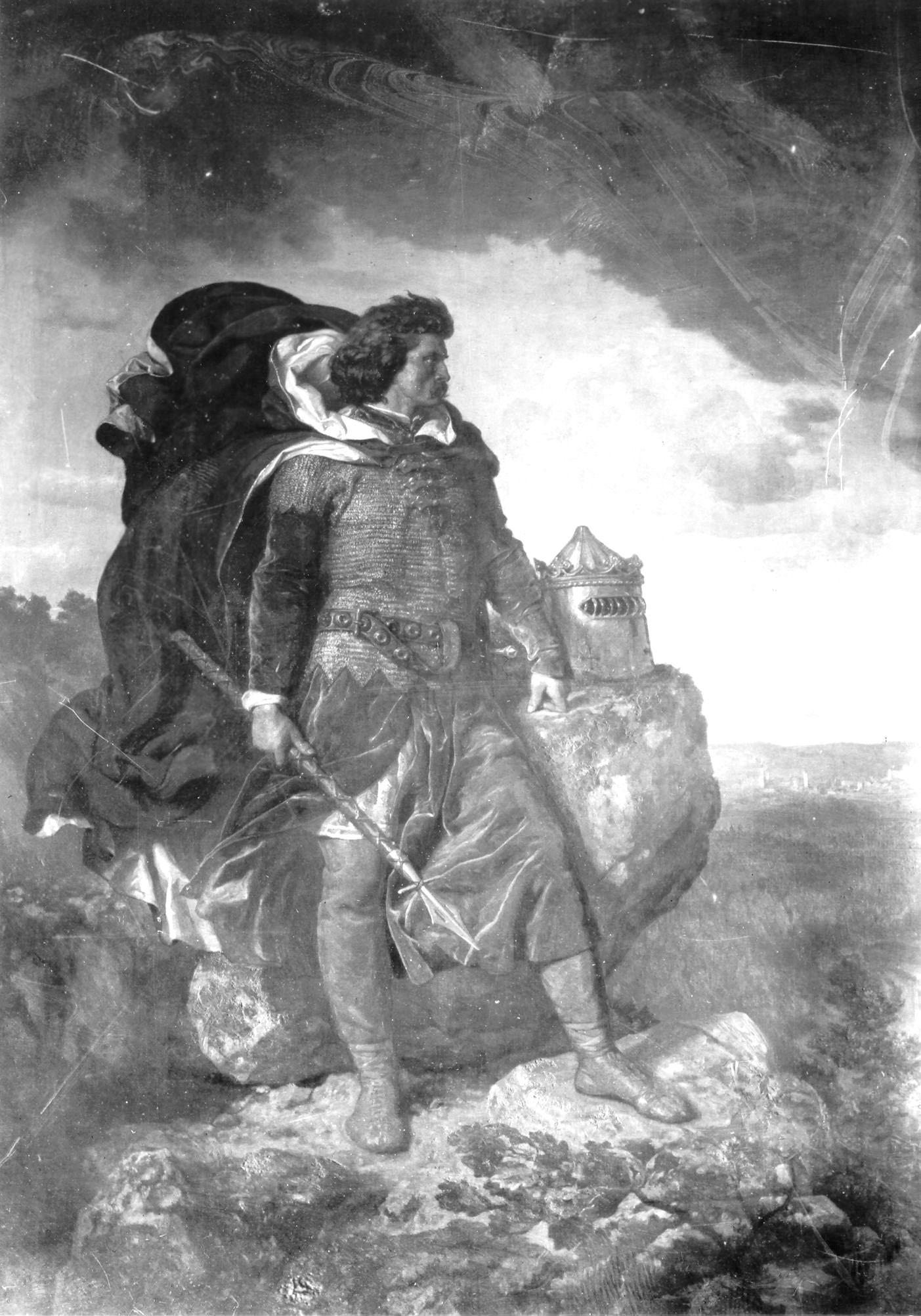 Władysław Łokietek in Ojców crags